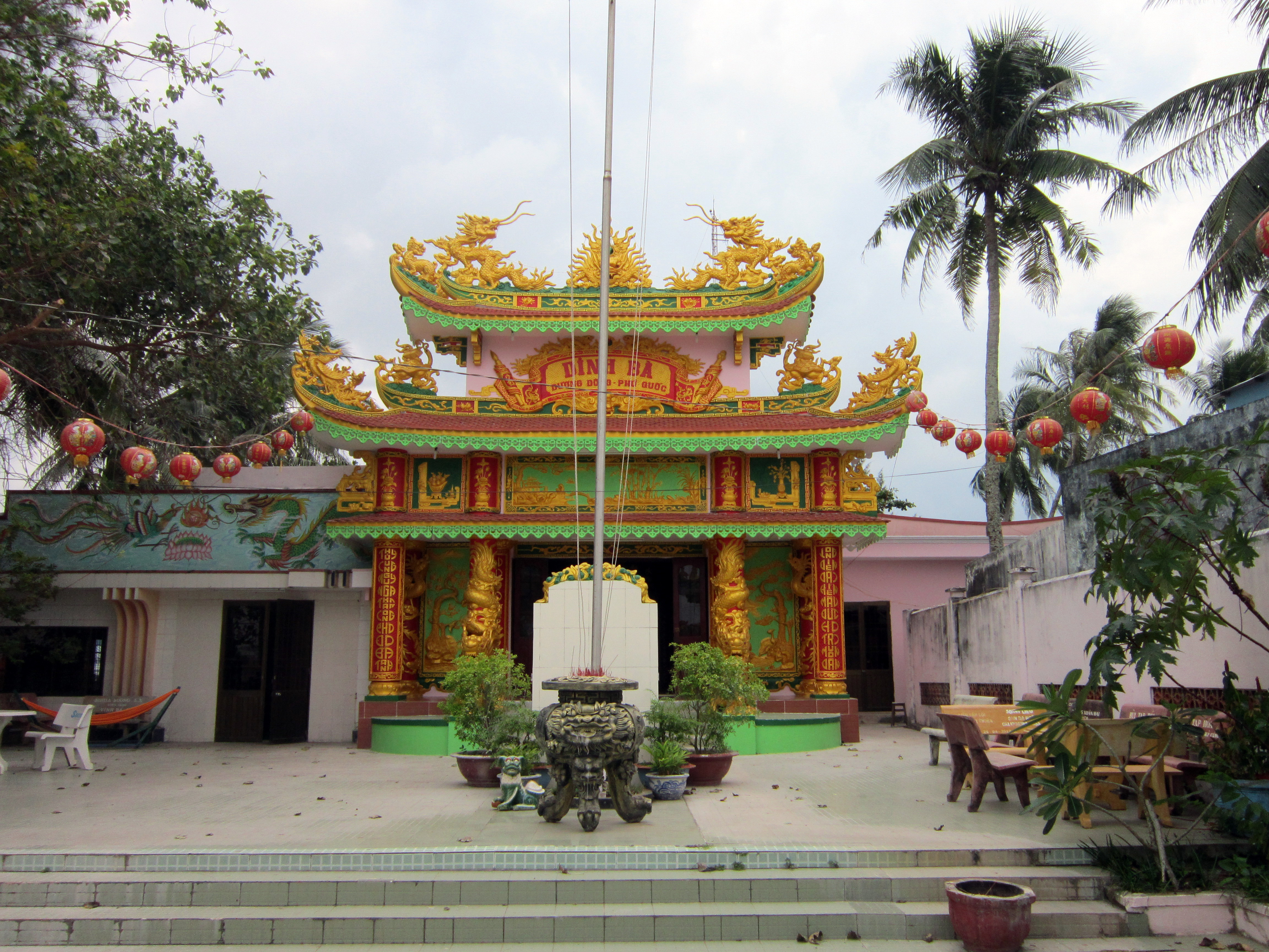 Dinh Bà Thủy Long Thánh Mẫu (gọi tắt là Dinh Bà) tọa lạc trên đường Võ Thị Sáu (gần Dinh Cậu), thị trấn Dương Đông, huyện Phú Quốc, tỉnh Kiên Giang, Việt Nam. Không rõ năm dựng, chỉ biết lúc đầu được làm bằng cột trai, mái tranh vách ván. Do thời gian và chiến tranh tàn phá, dinh được trùng tu nhiều lần mới được đẹp đẽ và khang trang như ngày nay.